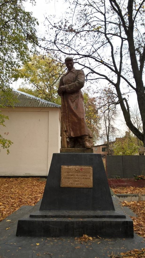 Пам'ятник героям, які загинули у роки Великої Вітчизняної Війни. Село Потіївка Радомишльського району Житомирської області.